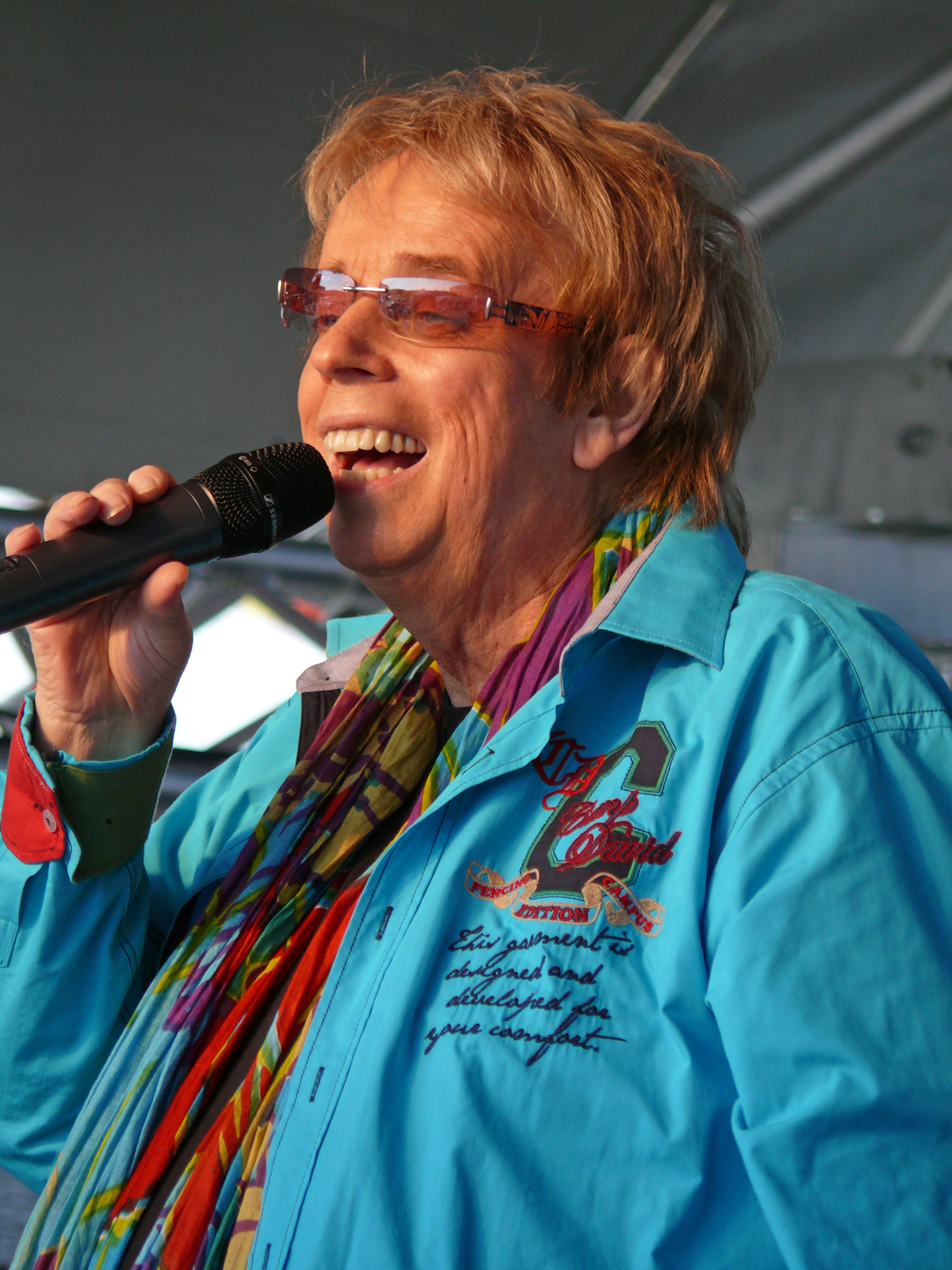 Ekki Göpelt während einer Veranstaltung in Berlin